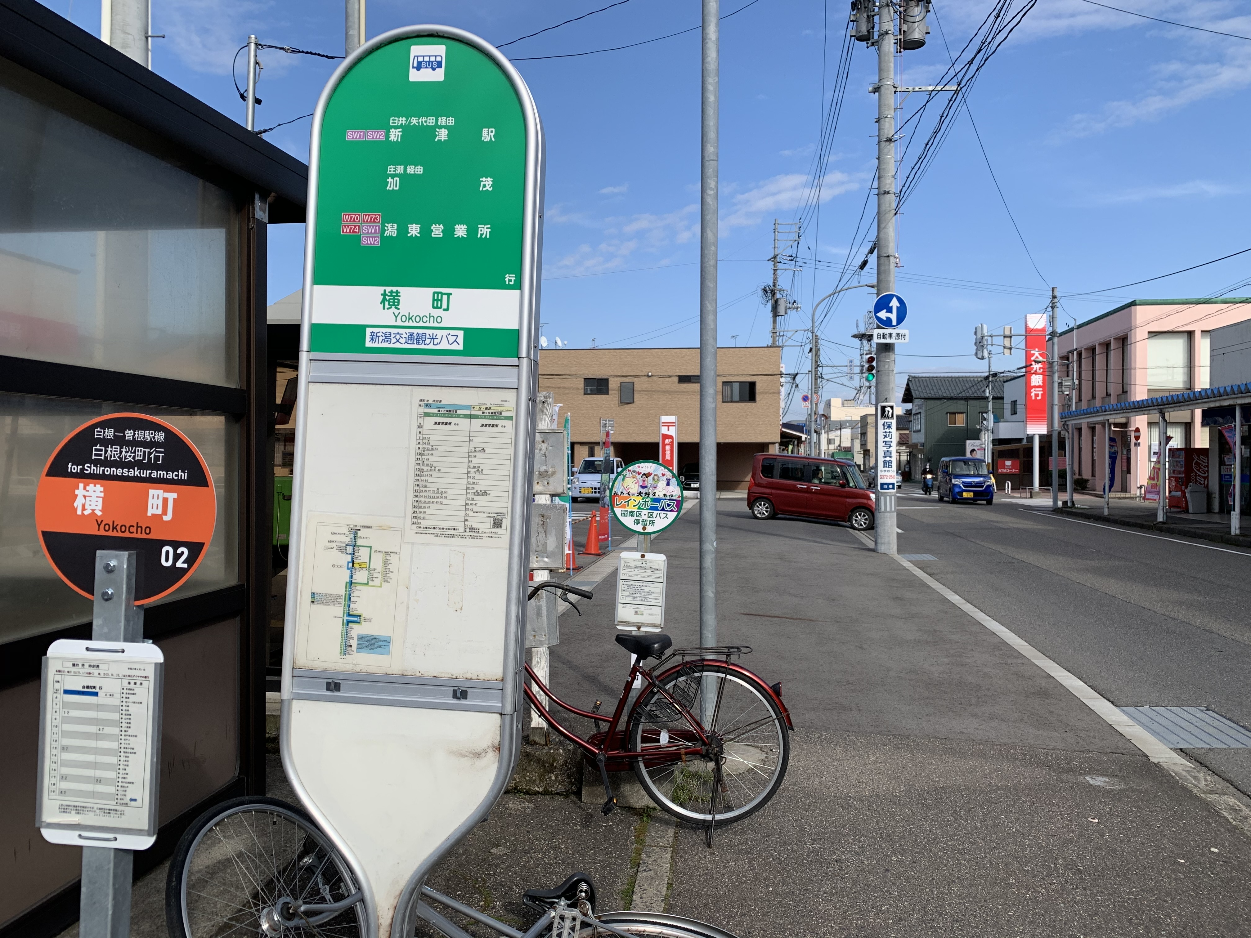 白根横町バス停（2020年3月）